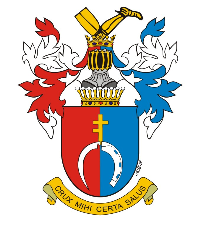 Herb Prus III z koroną hrabiego. Praca własna, opis herbu w: Simon Konarski, Armorial de la noblesse polonaise titrée, Paris 1957, opis w: Heinrich Kneschke, Deutsches Adelslexicon, Lepipzig 1865, inna wersja i ilustracja herbu w: Johannes Baptista Rietstap, "Armorial Général", oraz w herbarzu Siebmachera (1886).